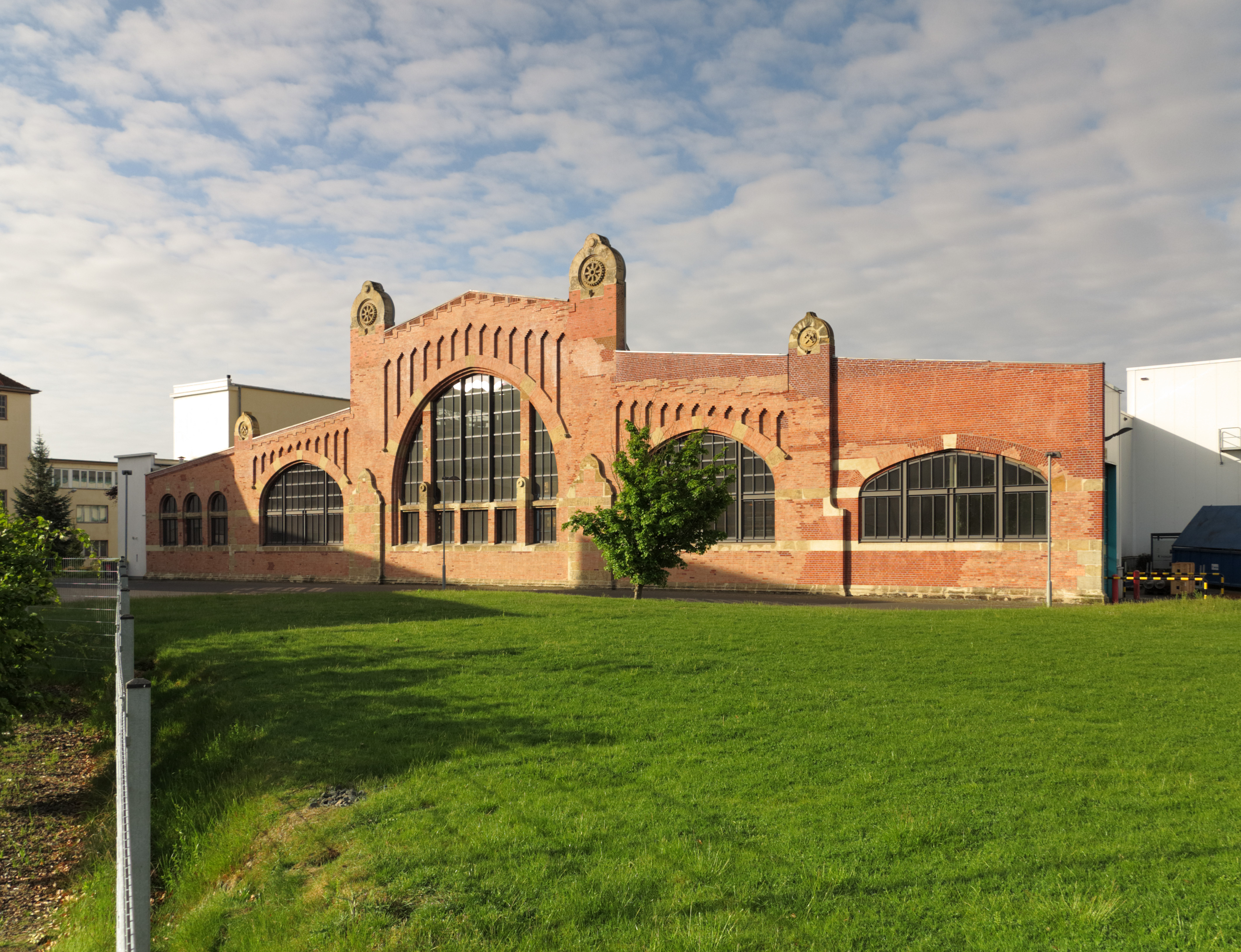 Die Fassade der Gießerei der MIAG (heute Bühler AG) in Braunschweig